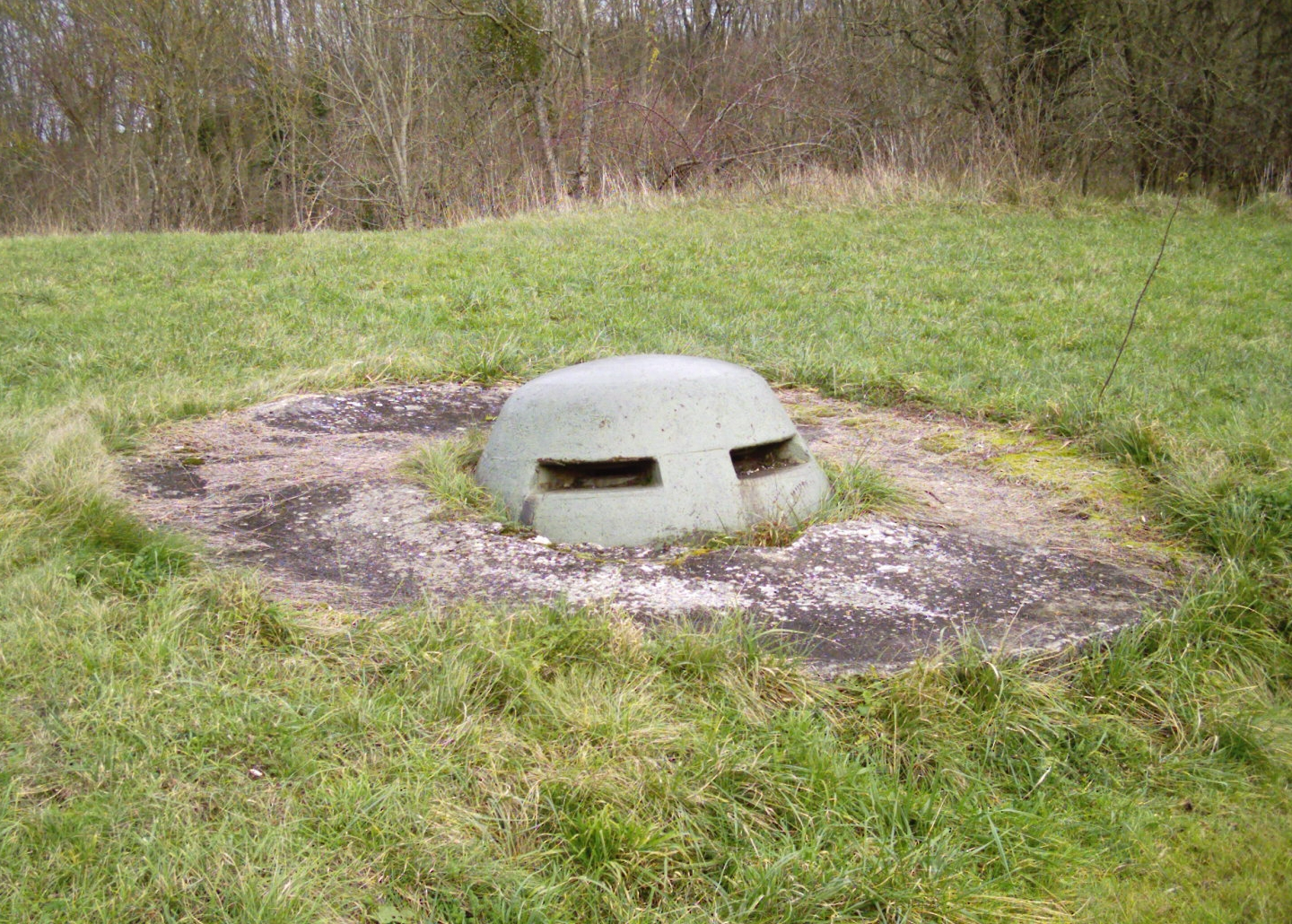 Cloche, ou observatoire blindé, du fort de Villey-le-Sec.